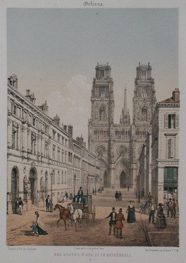 Estampe représentant la rue Jeanne d'Arc et la cathédrale Sainte-Croix au XIXè siècle à Orléans (Loiret, Centre, France).